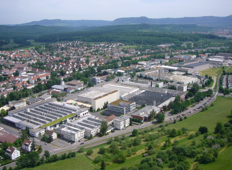 Luftaufnahme des Hauptstandorts in Nürtingen